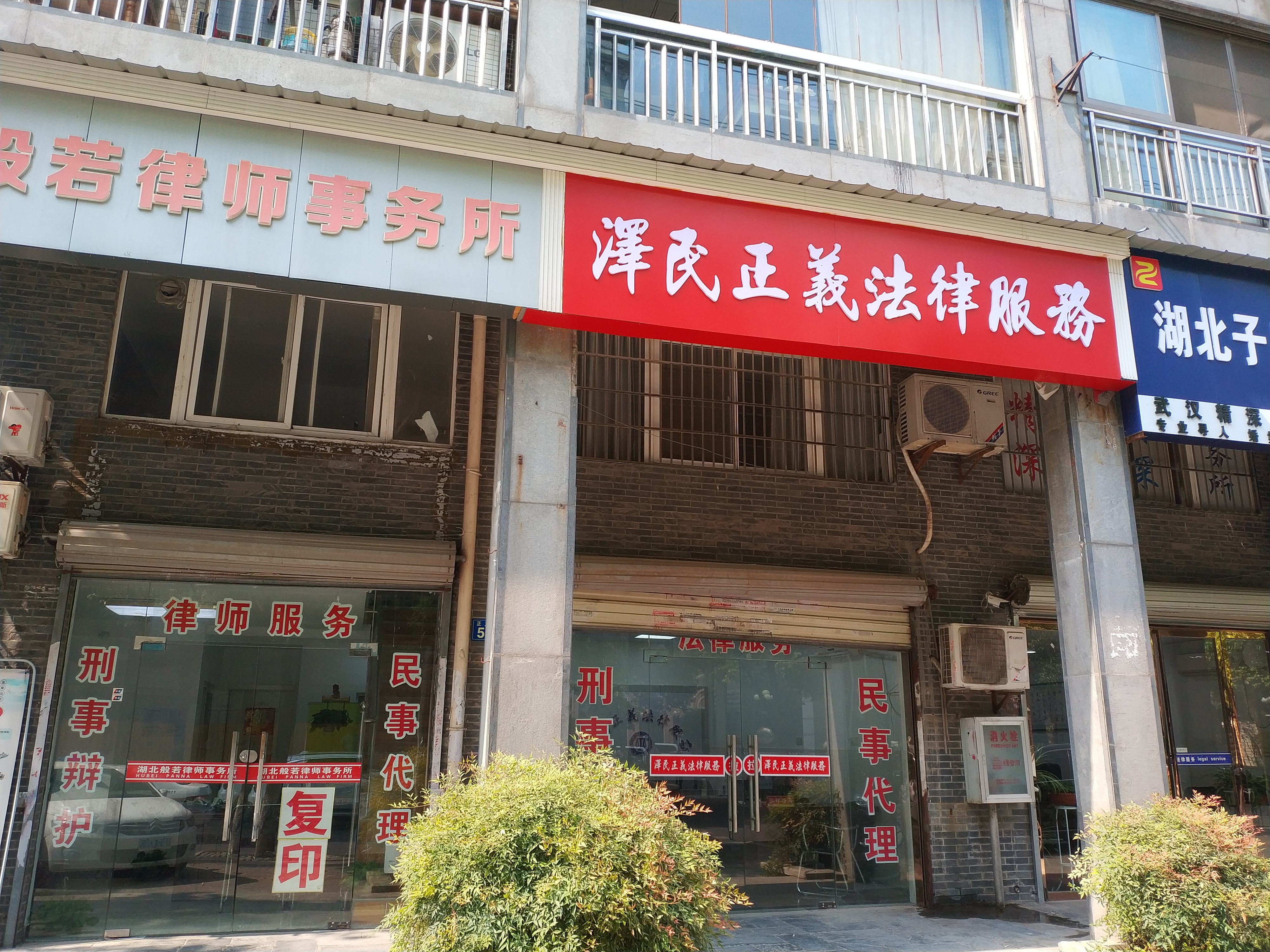 位于中国武汉市江岸区正义路江岸区法院对面的数家从事刑事辩护，民事代理，法律援助，背景调查等业务的律师事务所。